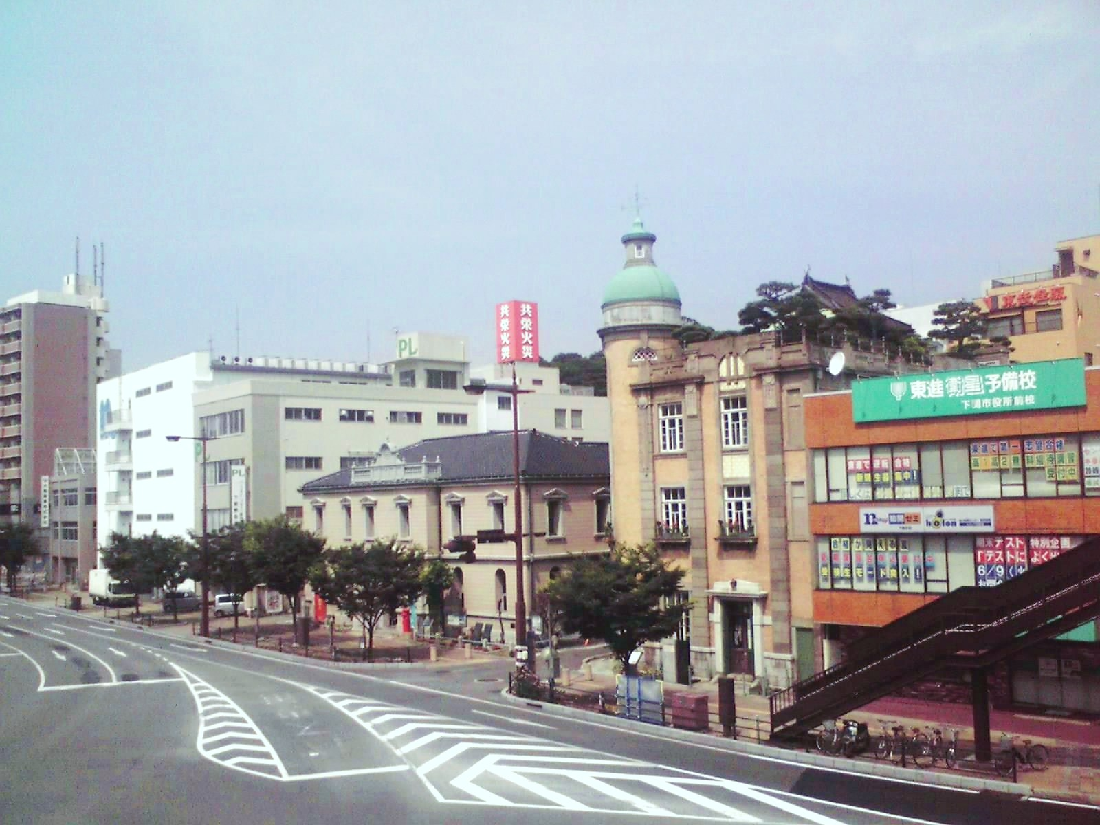 下関市南部町付近の画像。